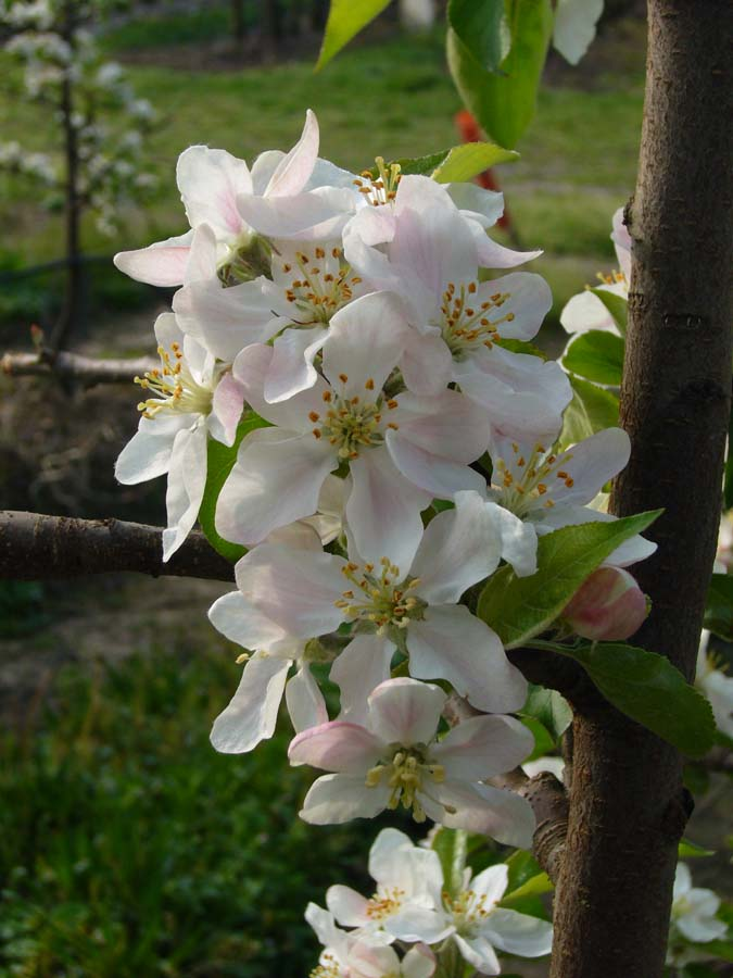 Fleurs de pommier HoneyCrunch